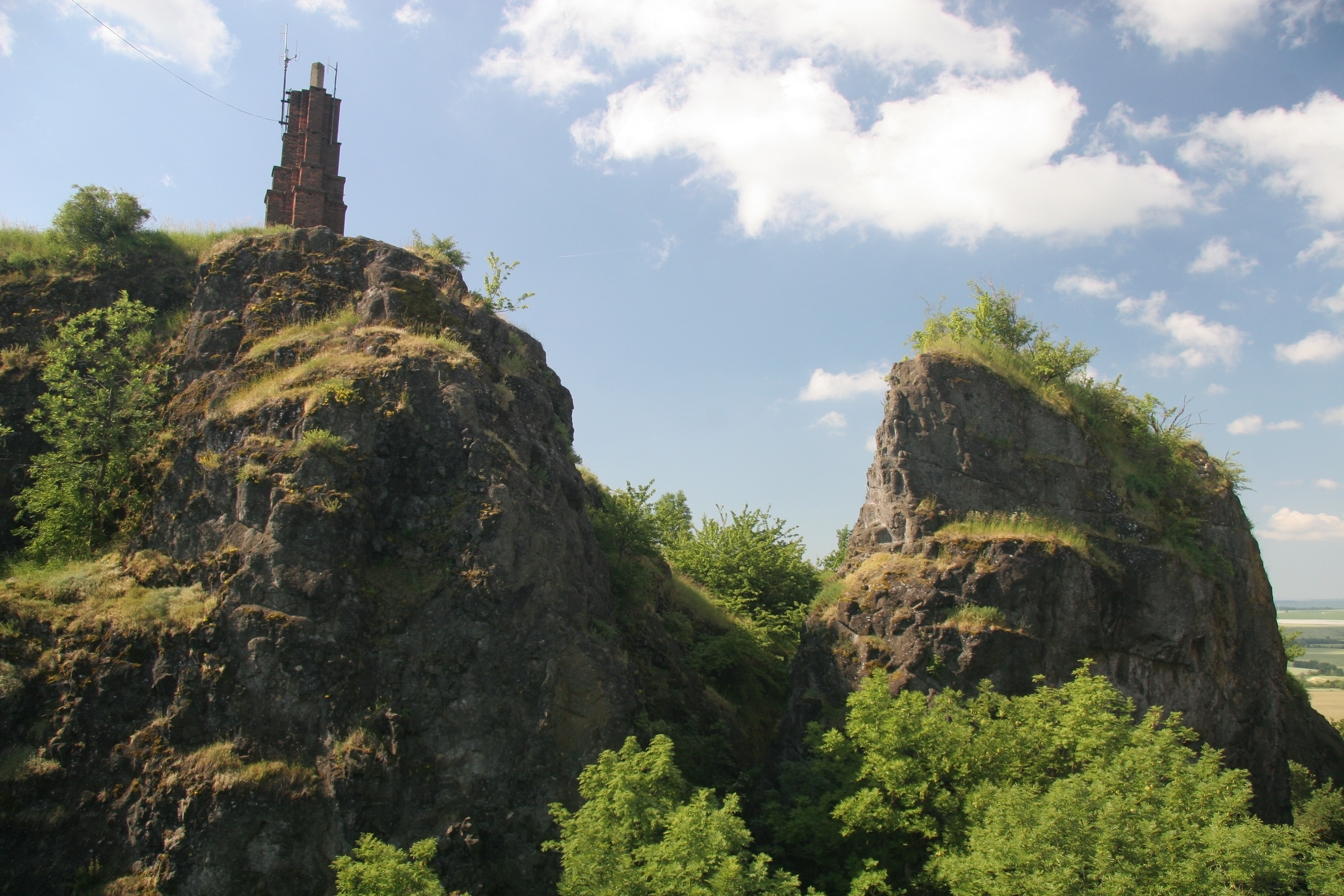 Hrad Veliš, zřícenina (Podhradí), Podhradí